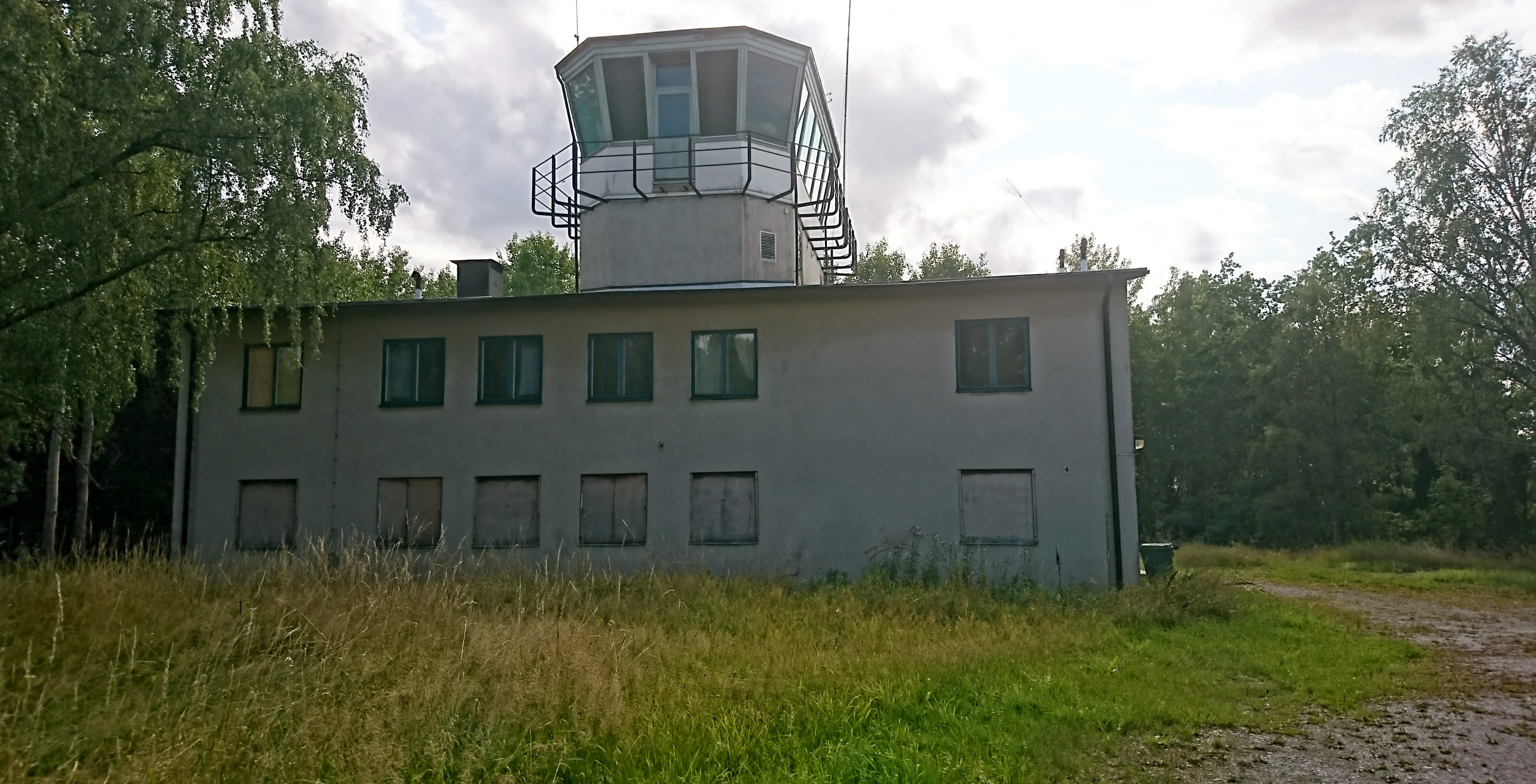 Trafikledartornet vid flygbasen. På bottenvåningen huserade signalavdelningen, andra våningen låg väderavdelningen, och i tornet huserade flygtrafikavdelningen.